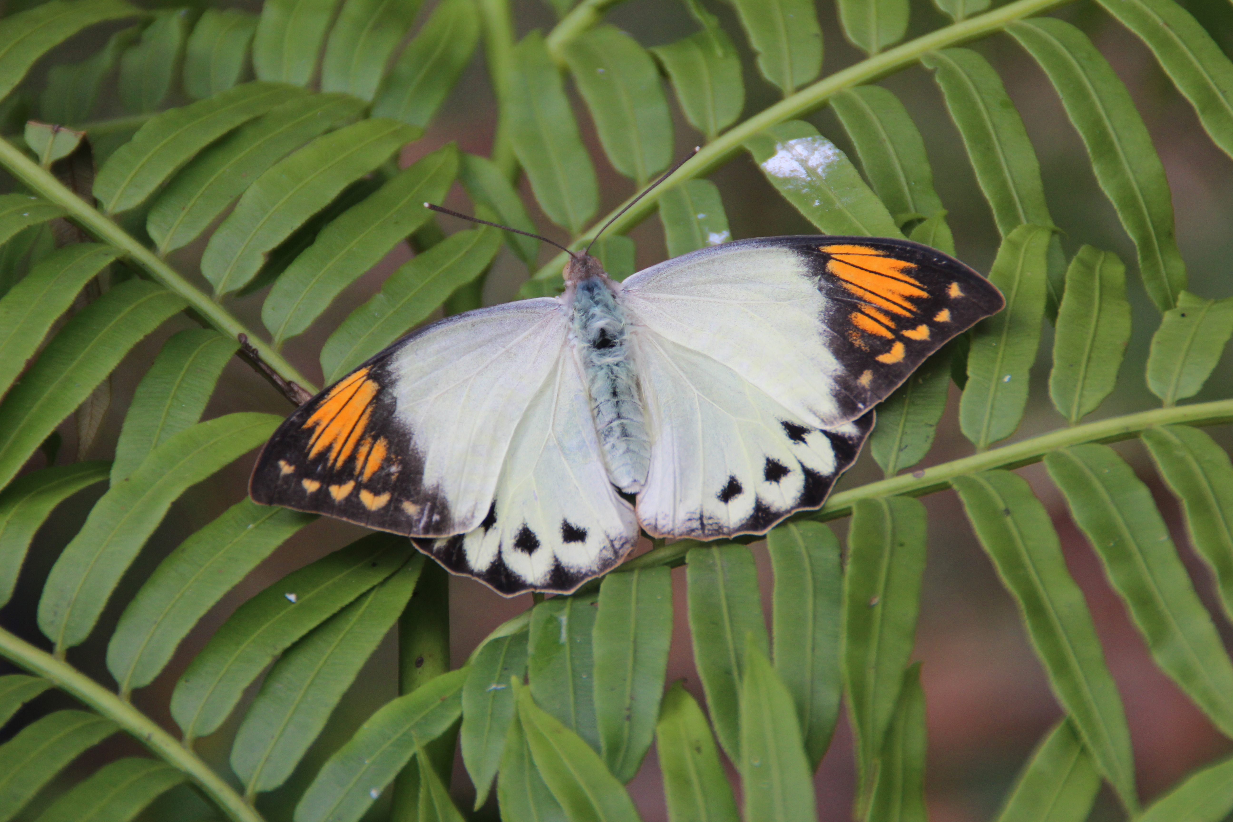 130端紅蝶9(劉建湘攝)